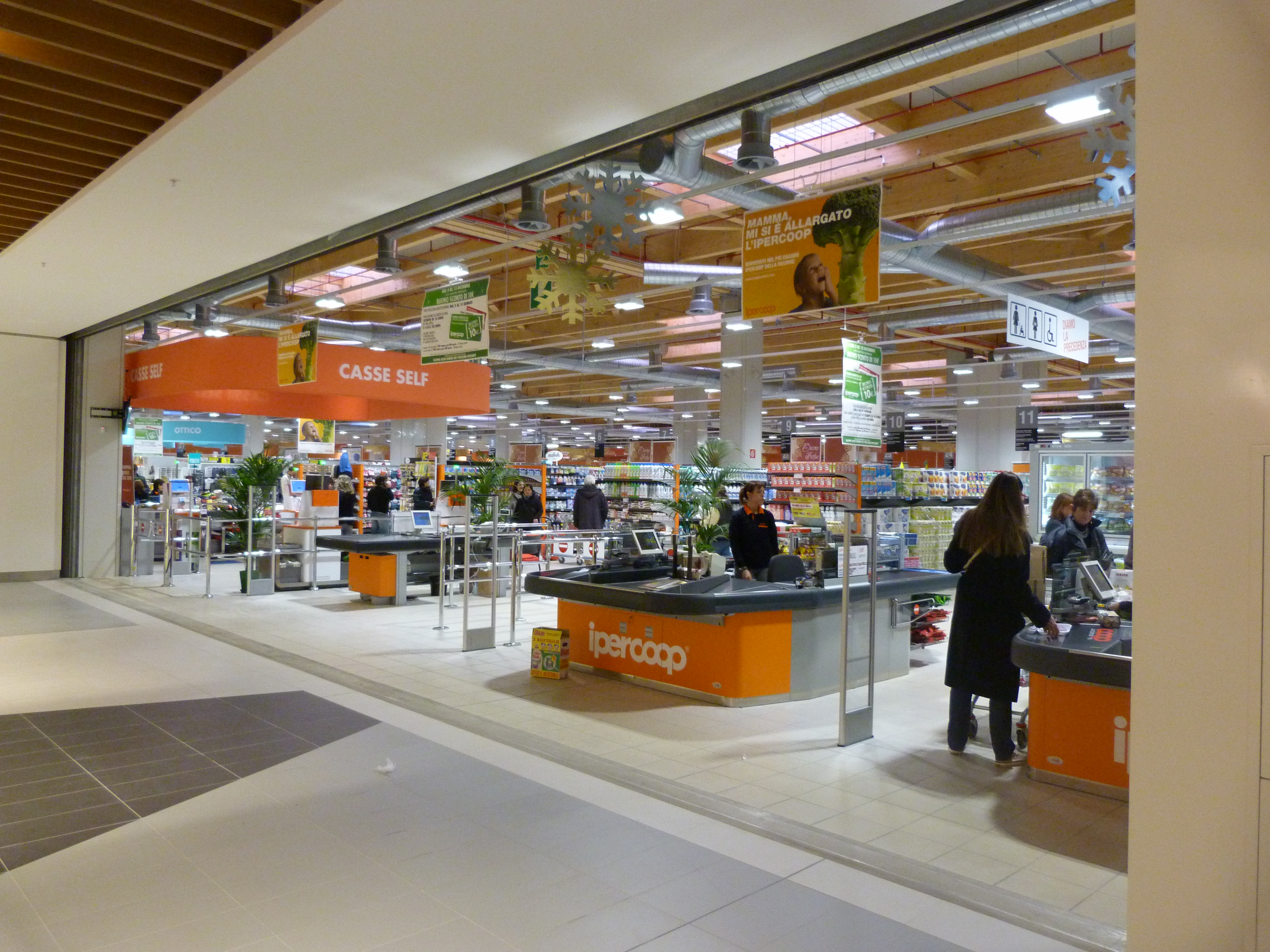 Ipercoop Consumatori Nord Est